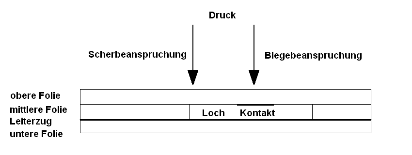 Prinzip der Folientastatur